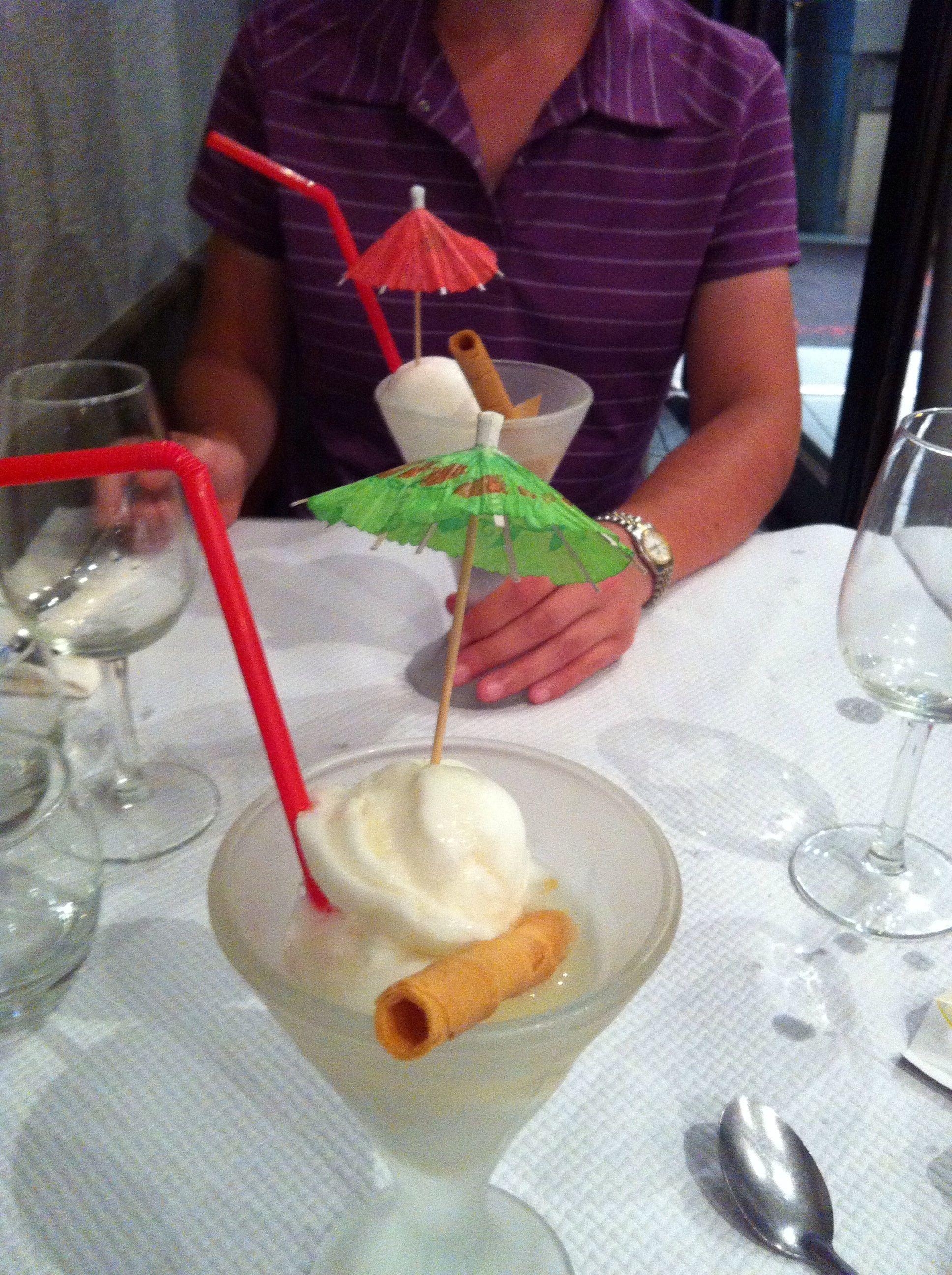 480_Sète - Colonel (sorbet citron + vodka)